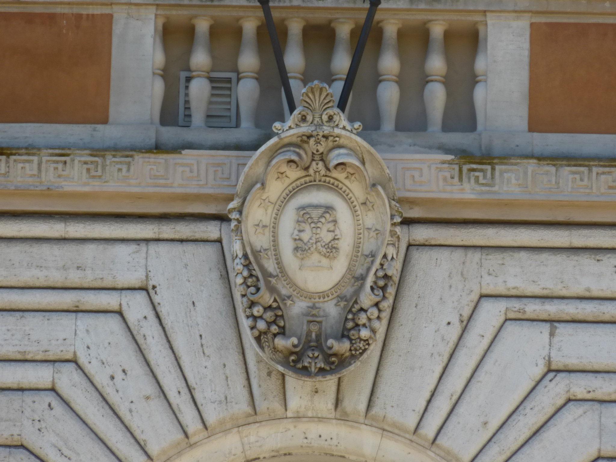 Roma, American Academy al Gianicolo: stemma con Giano bifronte.